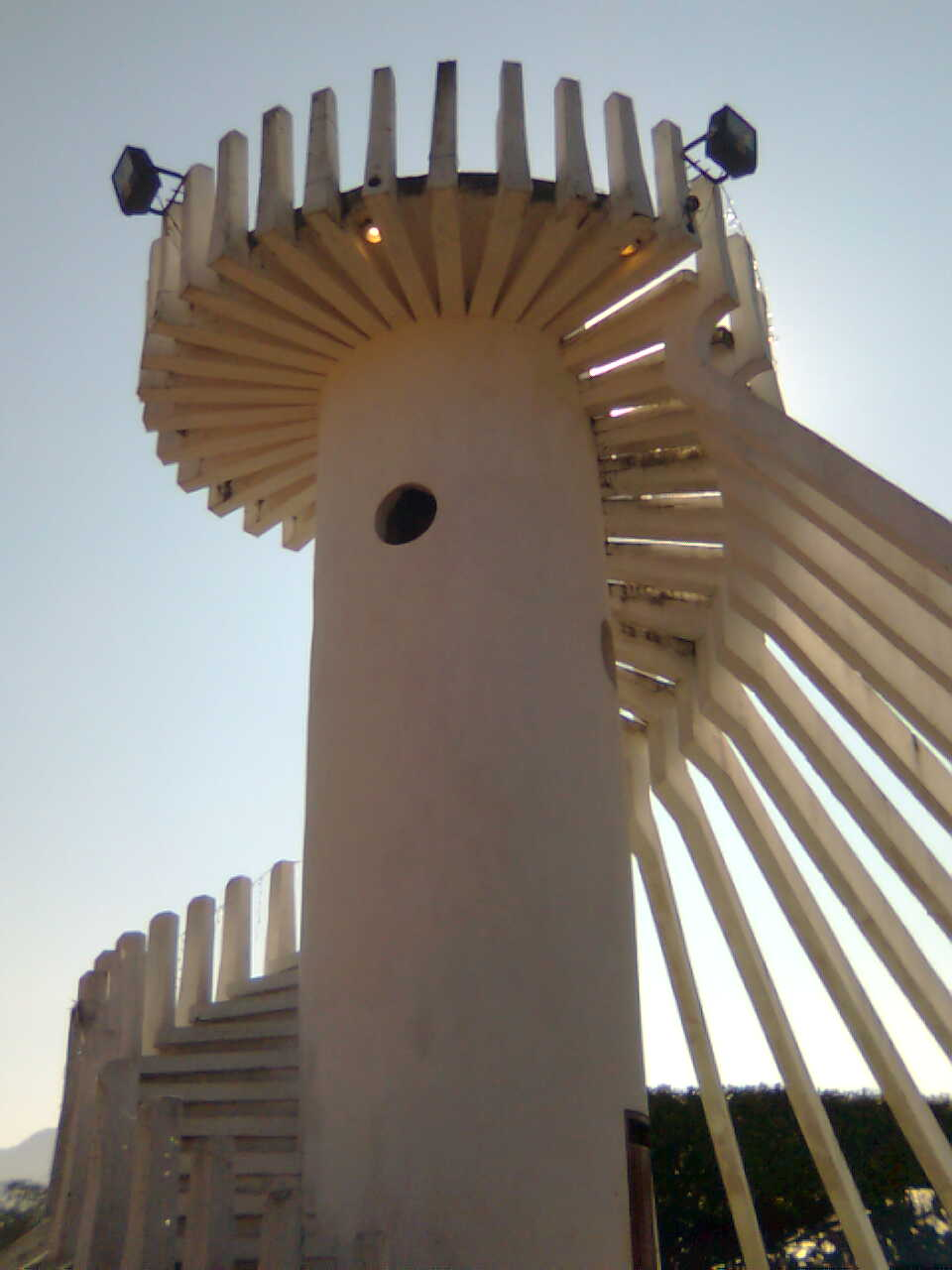 El caracol en la plaza principal de Citlaltépetl